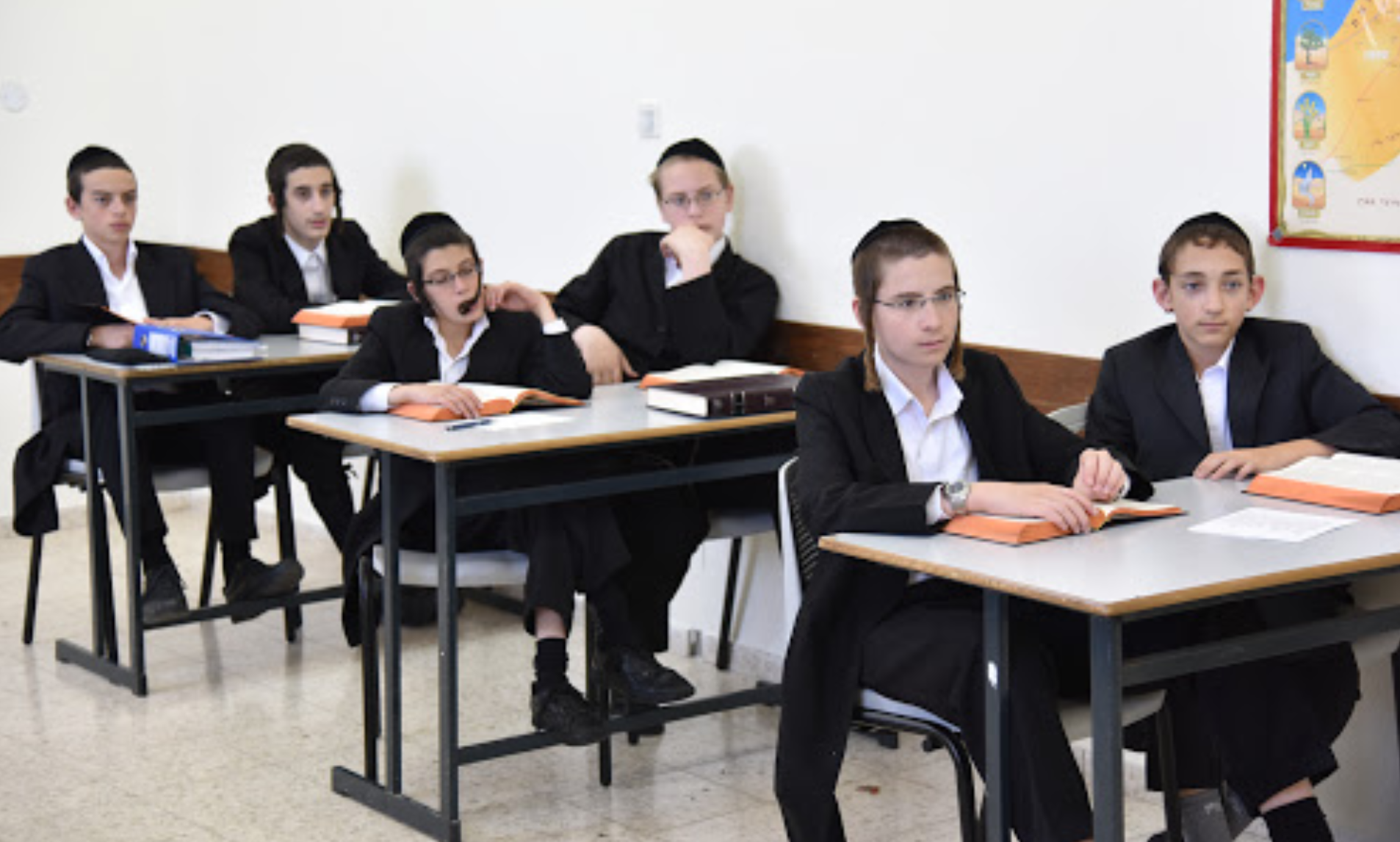 בשיעור גמרא